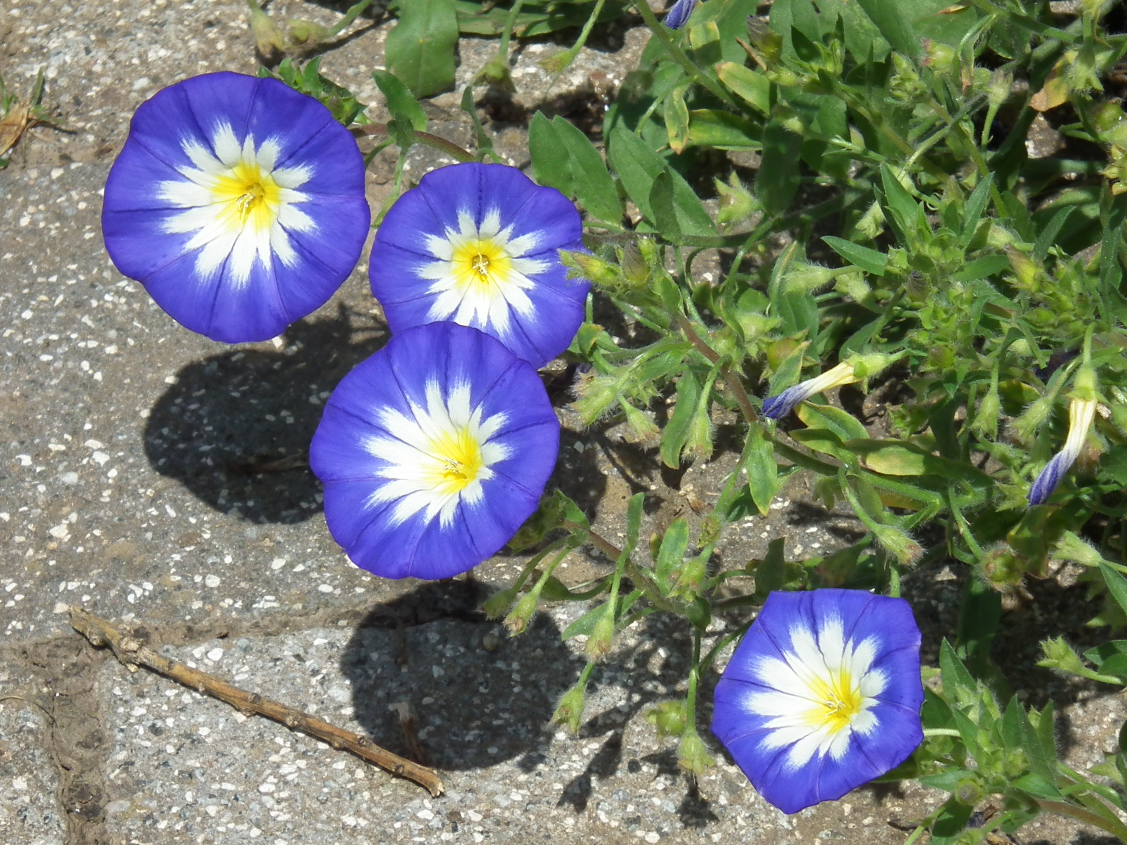 Dreifarbige Winde (Convolvulus tricolor)